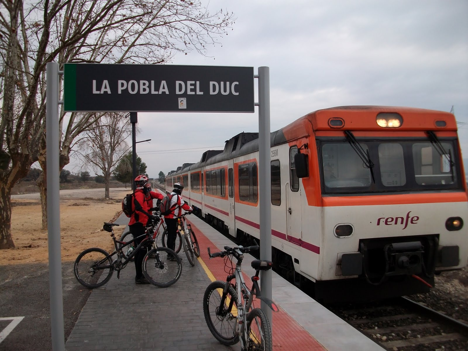 estacio pobla del duc